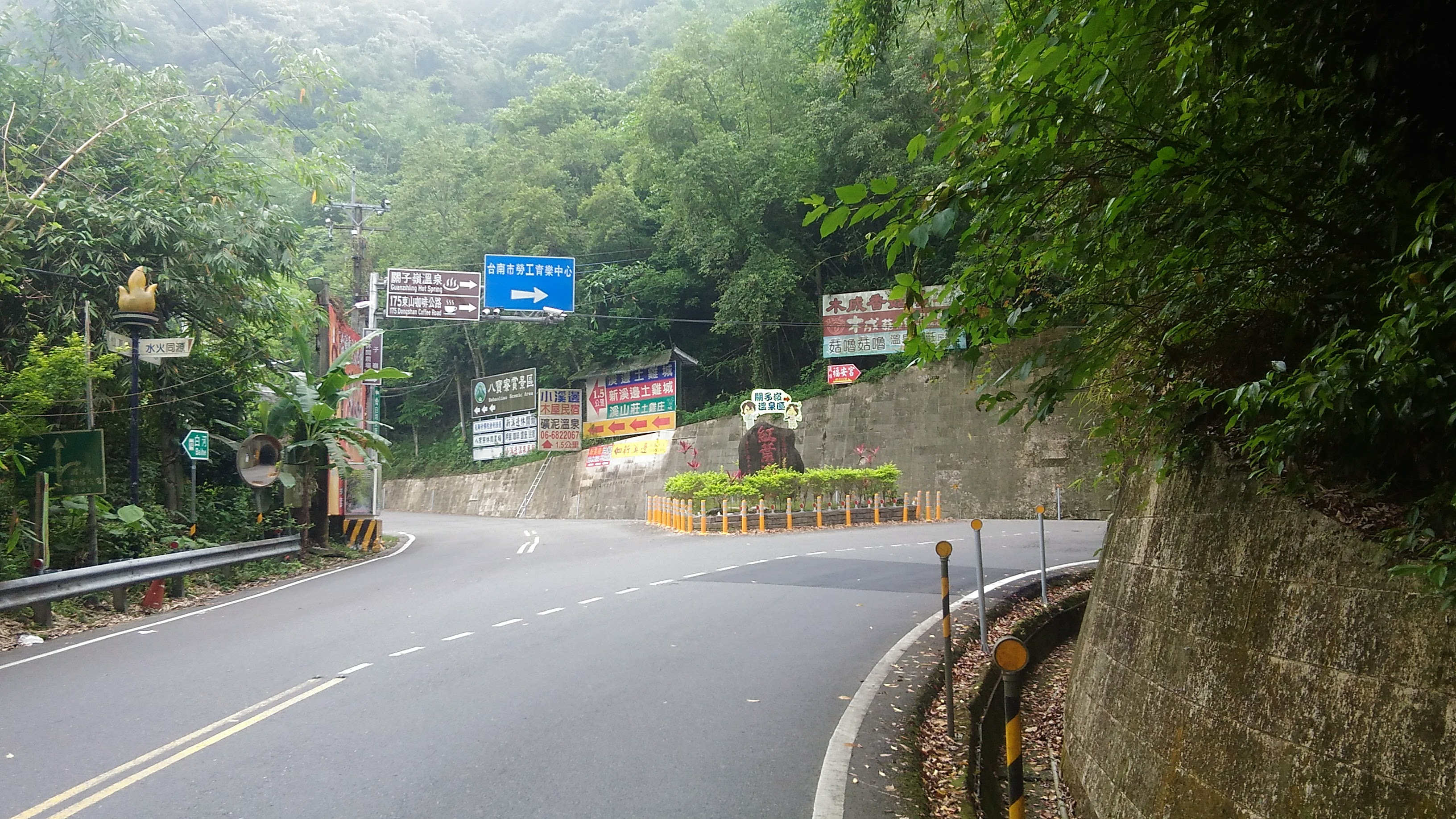 市道172号 (台湾)42.6km地点。右側の道路はja:市道175号 (台湾)起点